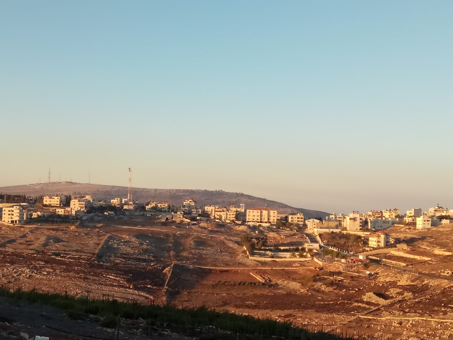 הר גריזים והר עיבל במבט מהיישוב הר ברכה